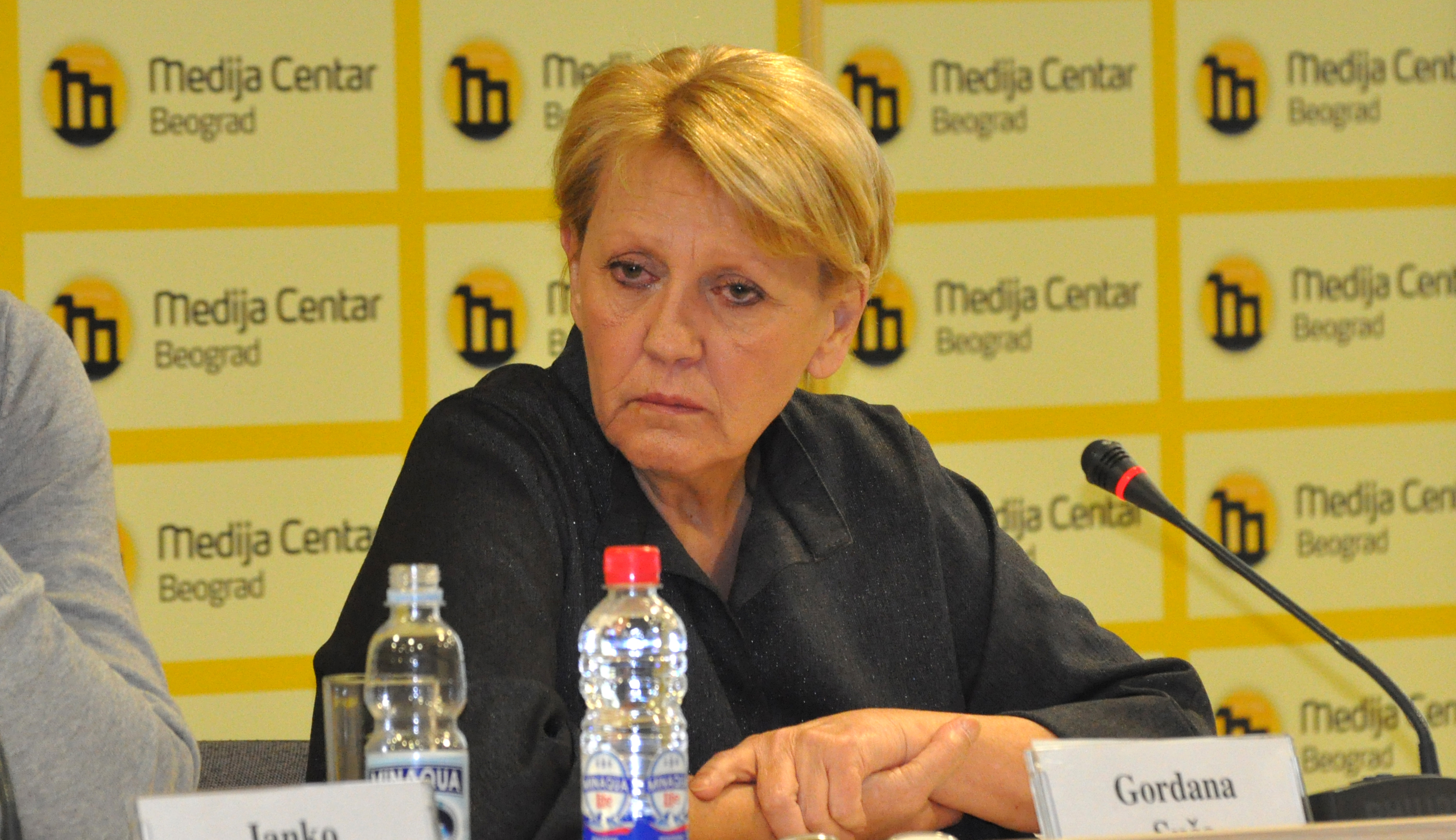 Gordana Suša srpska novinarka